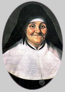 Imagen de una miniatura con el rostro de Santa Julia Billiart. Se cree que fué realizado pocos años antes de la muerte de la santa, en 1816.